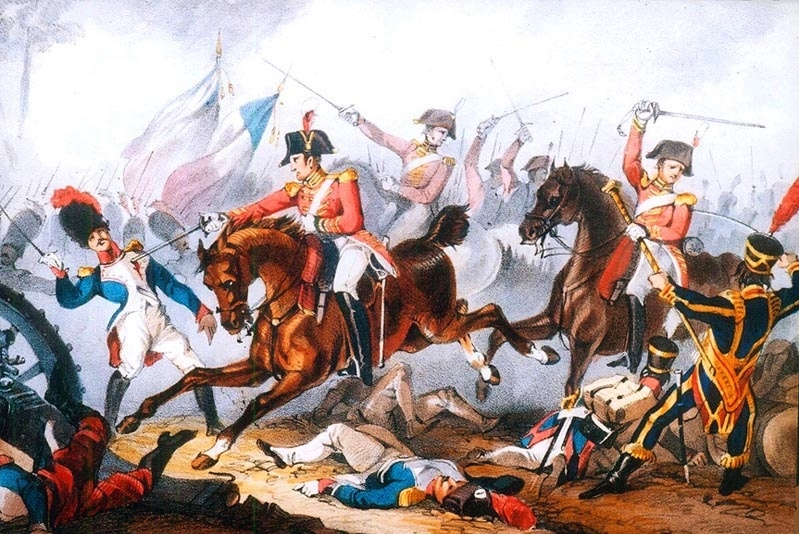 Le 5th Dragoon Guards à la bataille des Arapiles, 22 juillet 1812. Au cours de la charge, le major-général Le Marchant, commandant la brigade de cavalerie lourde, est tué.